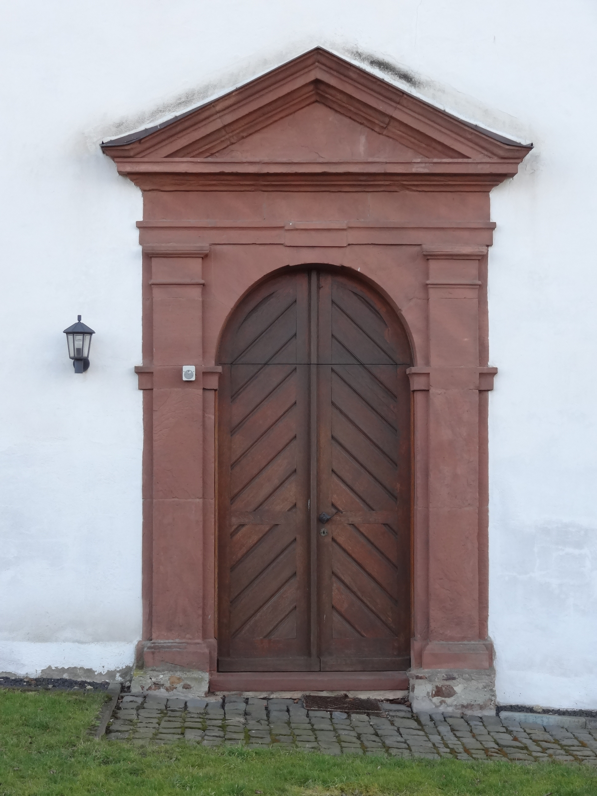 Evangelische Pfarrkirche (Gambach)